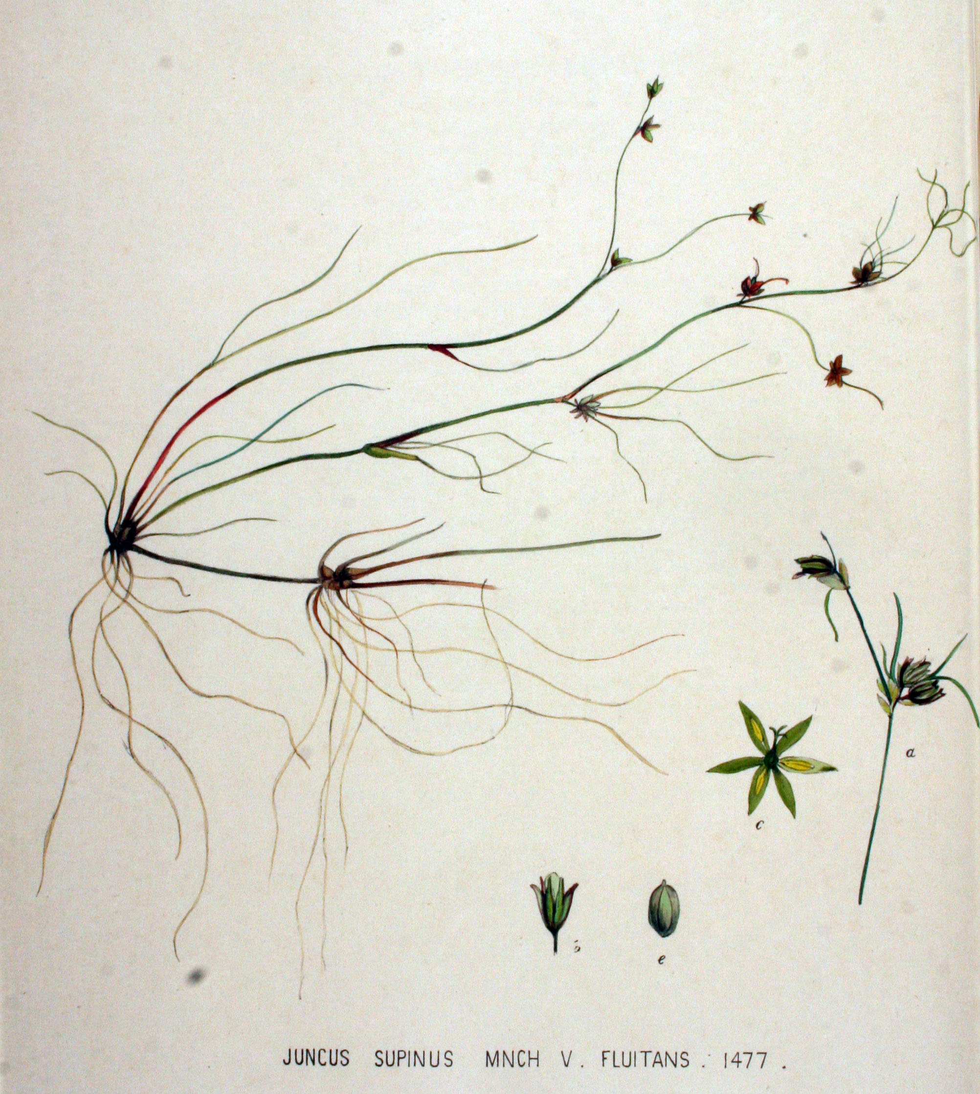 Juncus bulbosus L. subsp. bulbosus (Syn. Juncus supinus auct. non Moench.)